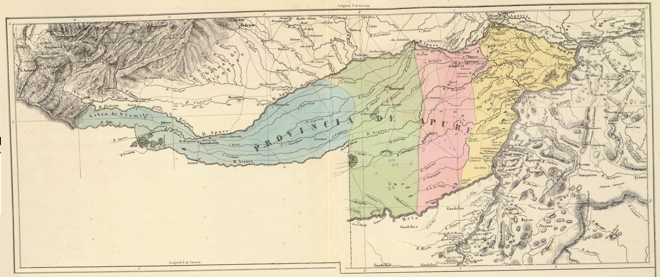 Provincia de Apure. Tomado del "Atlas físico y político de la República de Venezuela", 1840.